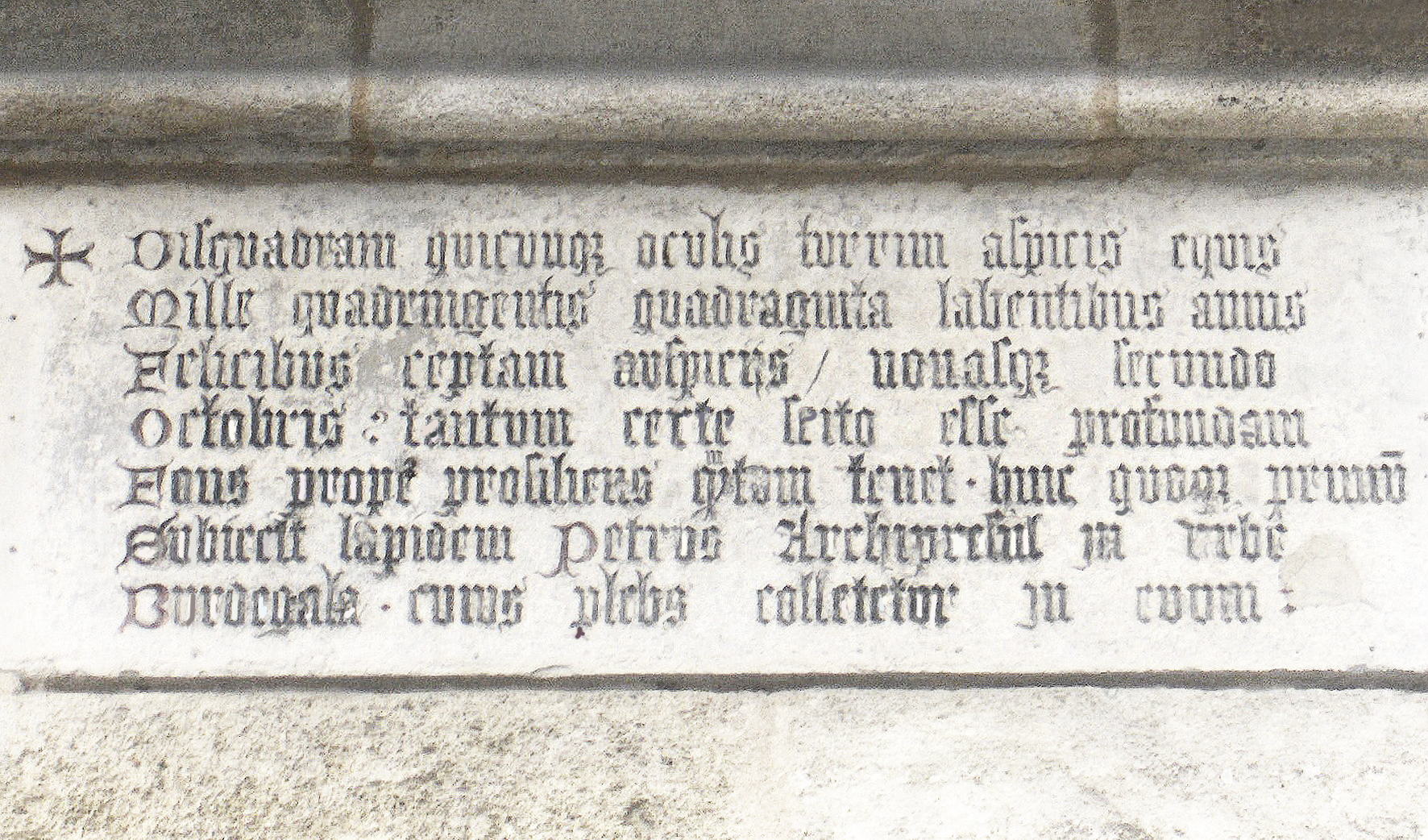 1 Disquadram quicumque oculis turrim aspicis aequis 2 Mille quadringentis quadraginta labentibus annis 3 Felicibus coeptam auspiciis nonasqua secundo 4 Octobris: tantum certe scito esse profundam 5 Fons prope prosiliens quantum tenet huic quoque primum 6 Subiecit lapidem Petrus Archipraesul in urbe 7 Burdigala. cuius plebs collaetetur in aevum. 1 Wer immer du mit gerechten Augen den un-viereckigen Turm anschaust, 2 der nach Ablauf von 1440 Jahren (seit Christi Geburt) 3 unter glücklichen Vorzeichen begonnen worden ist am Tag vor den Nonen des 4 Oktobers: wisse, dass er sicher so hoch ist, 5 wie der nahe sprudelnde Brunnen reicht (entfernt ist). Diesem (Turm) legte auch den ersten 6 Stein zu Grunde Petrus, Erzbischof der Stadt 7 Bordeaux. Und deren Bevölkerung soll voller Freuden sein auf ewig.